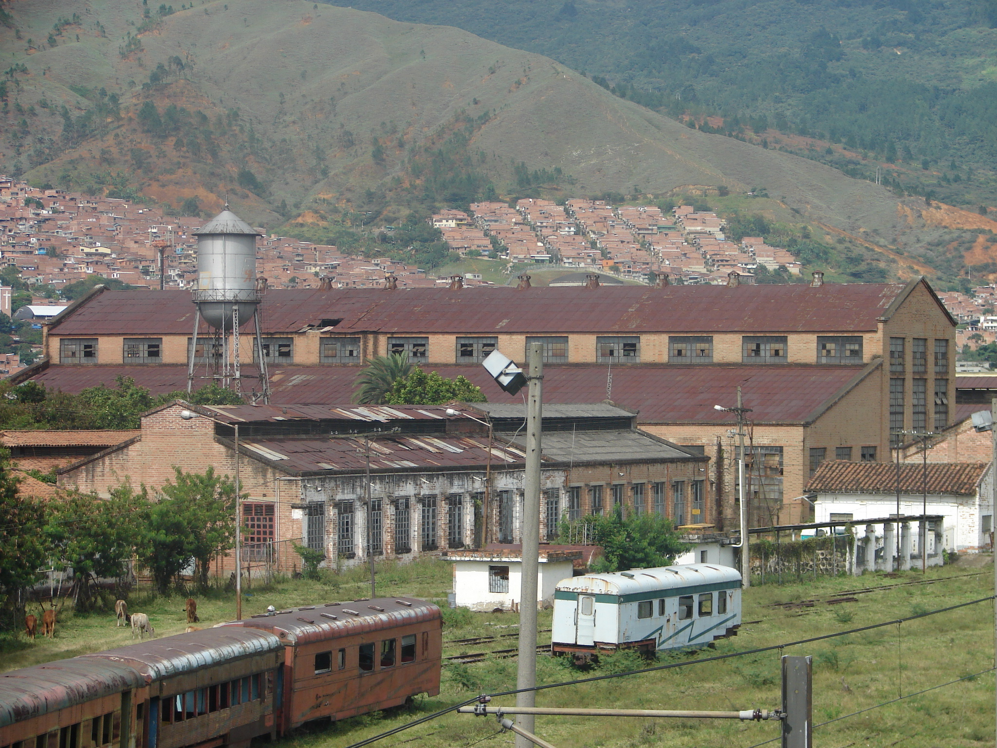 Antiguas dependencias del ferrocarril en el Municipio de Bello. Colombia.